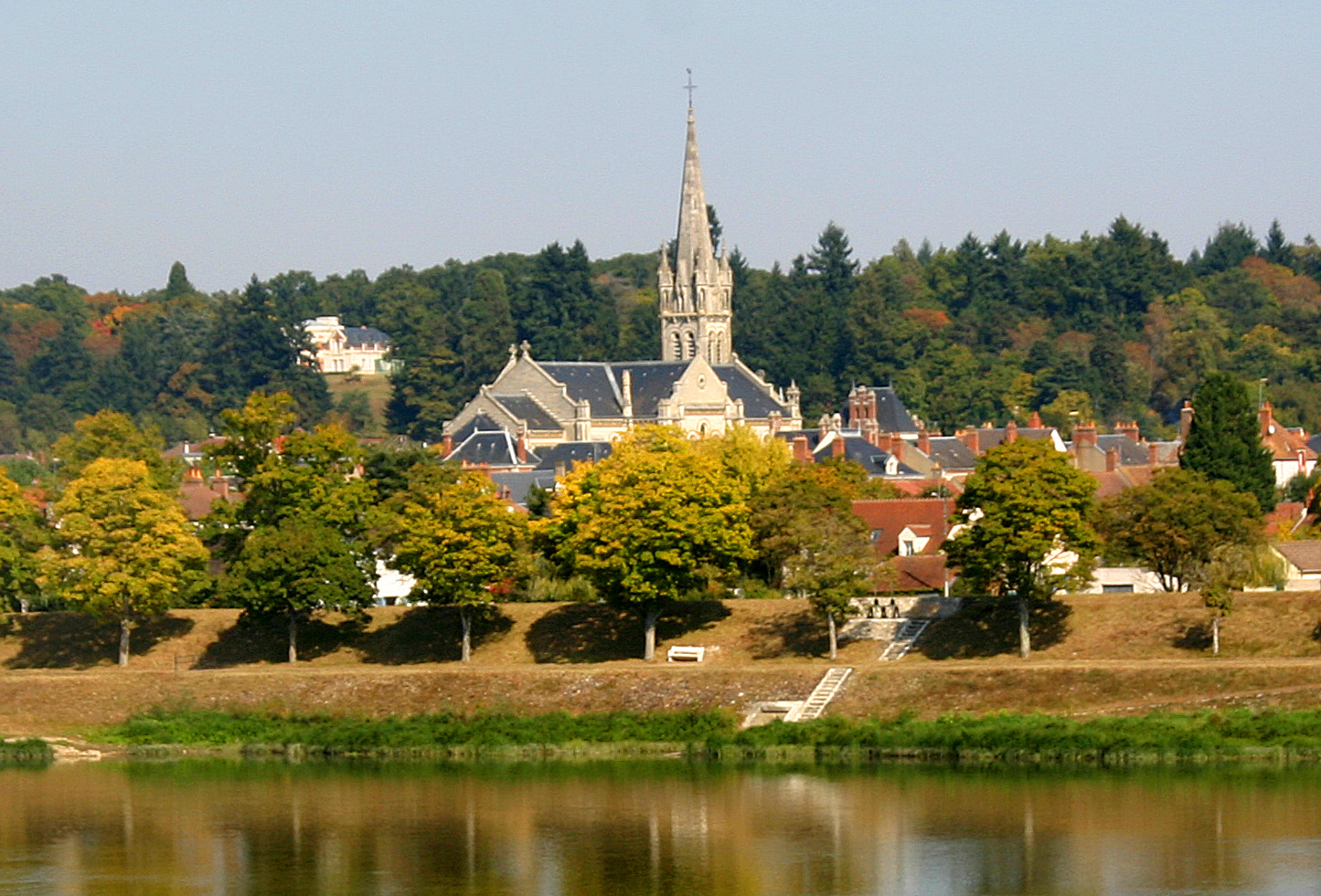 Kirche Saint-Étienne in Briare